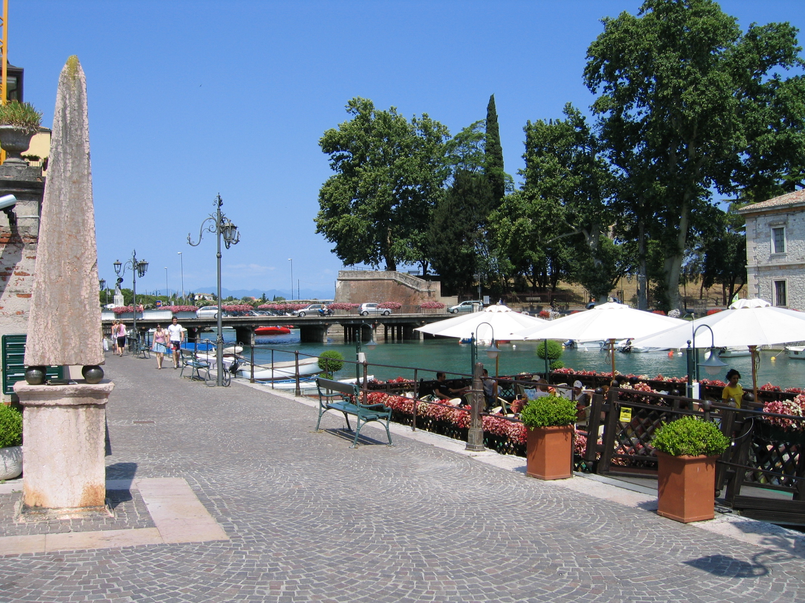 Peschiera del Garda, Veneto, Italia